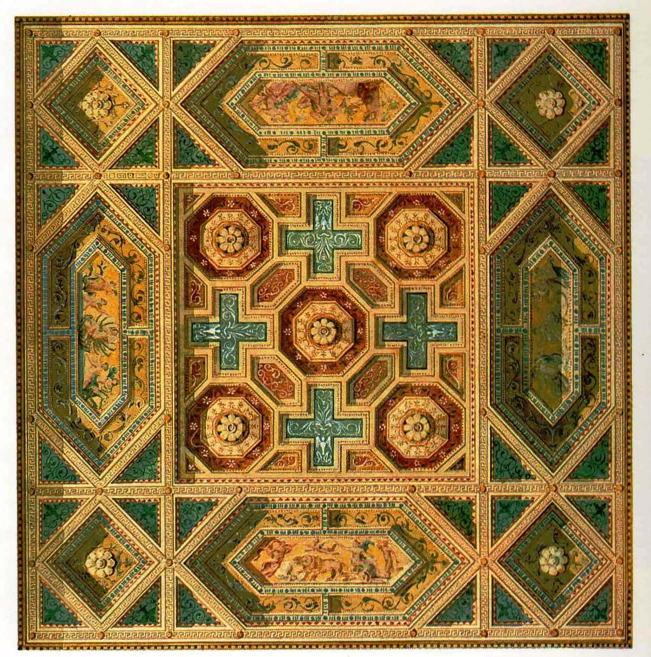 Dresden Palais Kaskel-Oppenheim, Salon Plafond - Löffler S. Plafond des Salons Palais Kaskel-Oppenheim entworfen von Gottfried Semper Kopie von C. Balthasar 1847